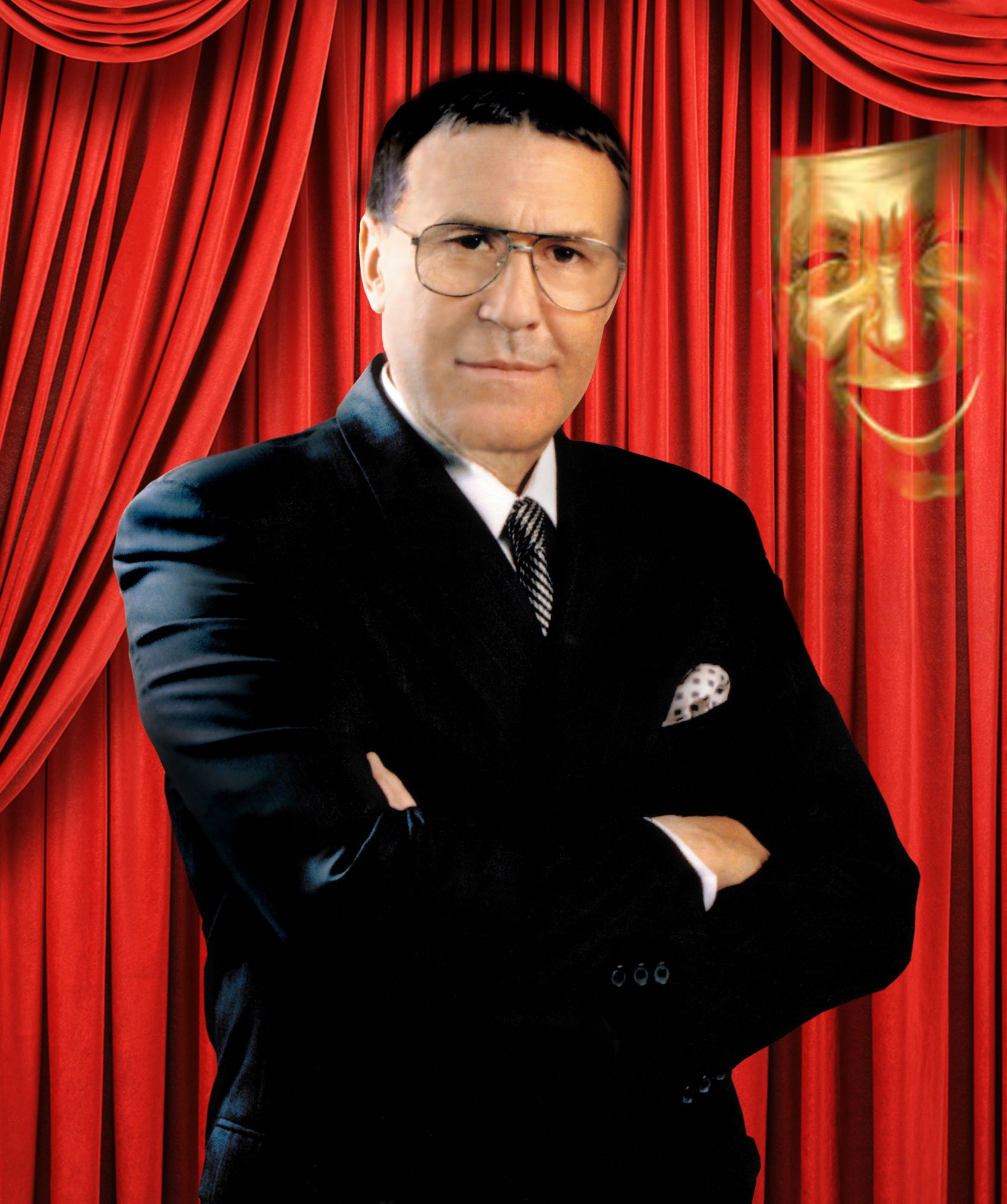 Алексей Моисеенко